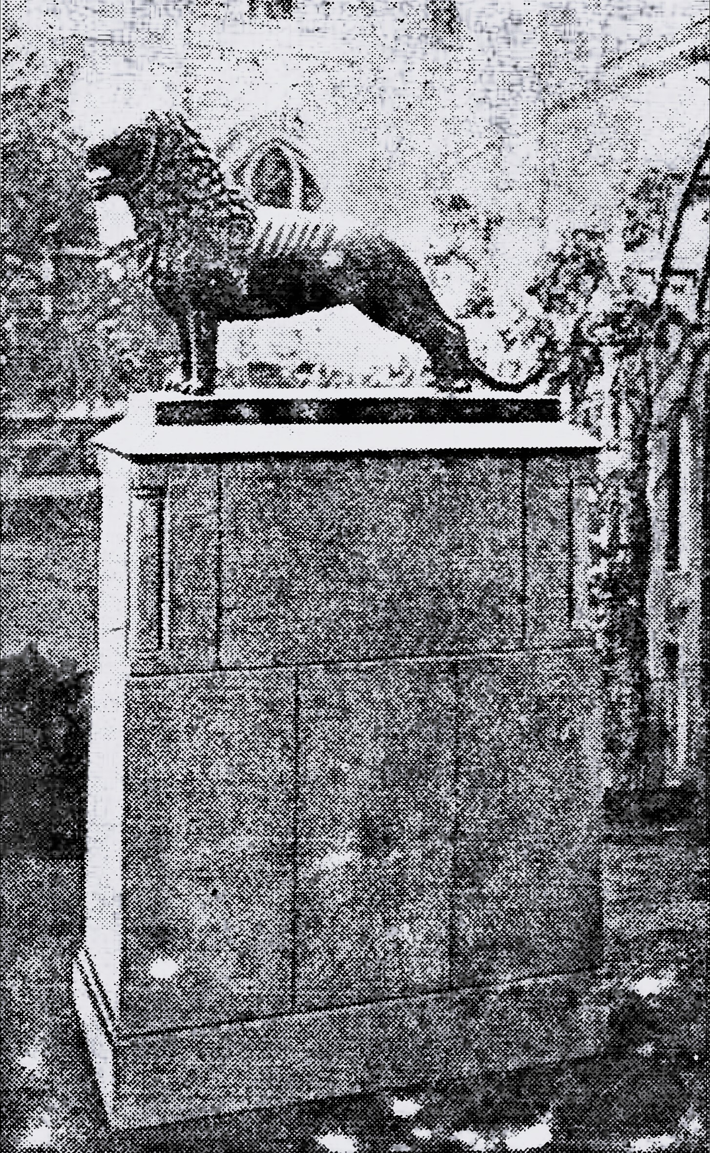 Das Denkmal für Heinrich den Löwen im Museumshof am Dom zu Lübeck.